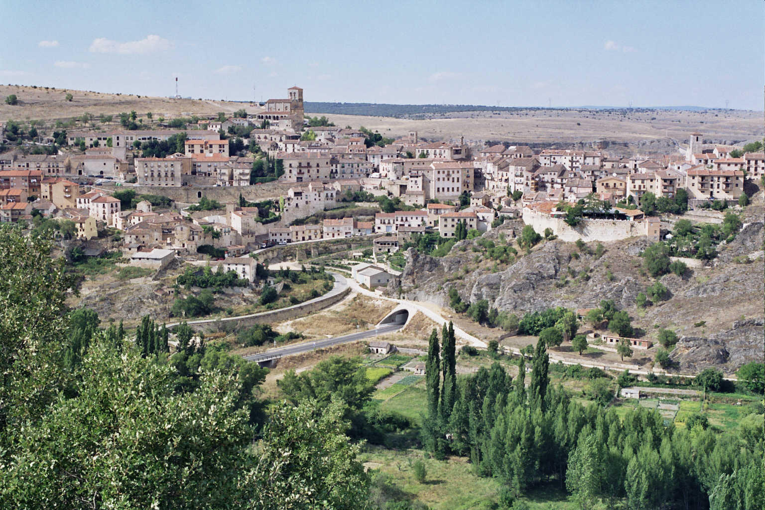 Segovia. (Castilla-León. España) Sepúlveda. Vista general. Fotografía realizada el 21 agosto de 2002 por el autor.User:Pelayo2.